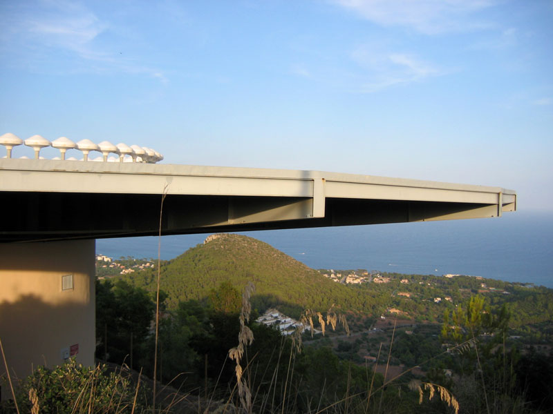 VOR/DME Funkfeuer bei Capdepera (eigenes Foto, Lizenz GNU-FDL)